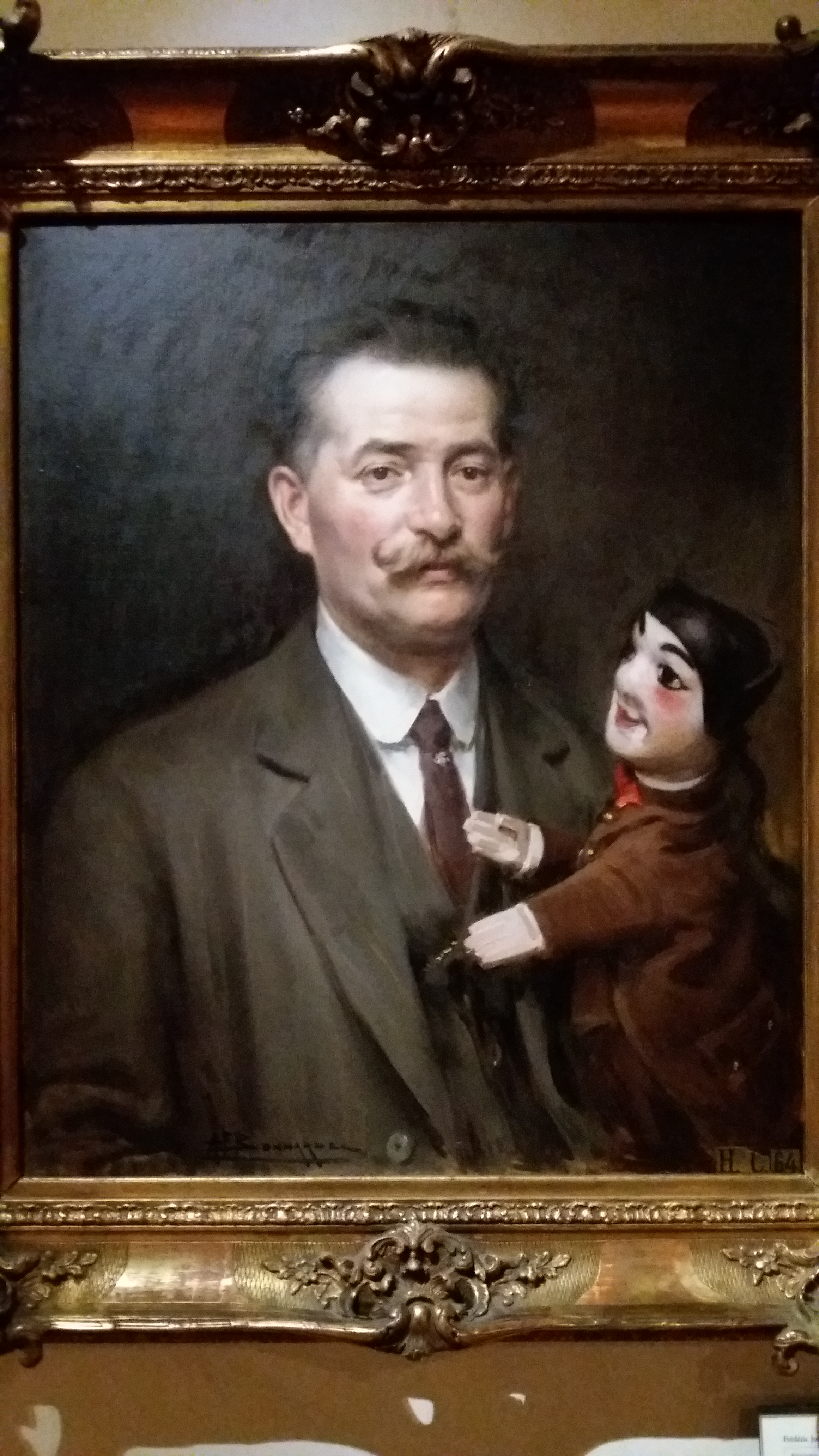 Huile sur toile : Frédéric Josserand (1878-1936). Par Alexandre François Bonnardel, à Lyon au début du XXe siècle. Inventaire : 004 (don Mourguet, 2004).